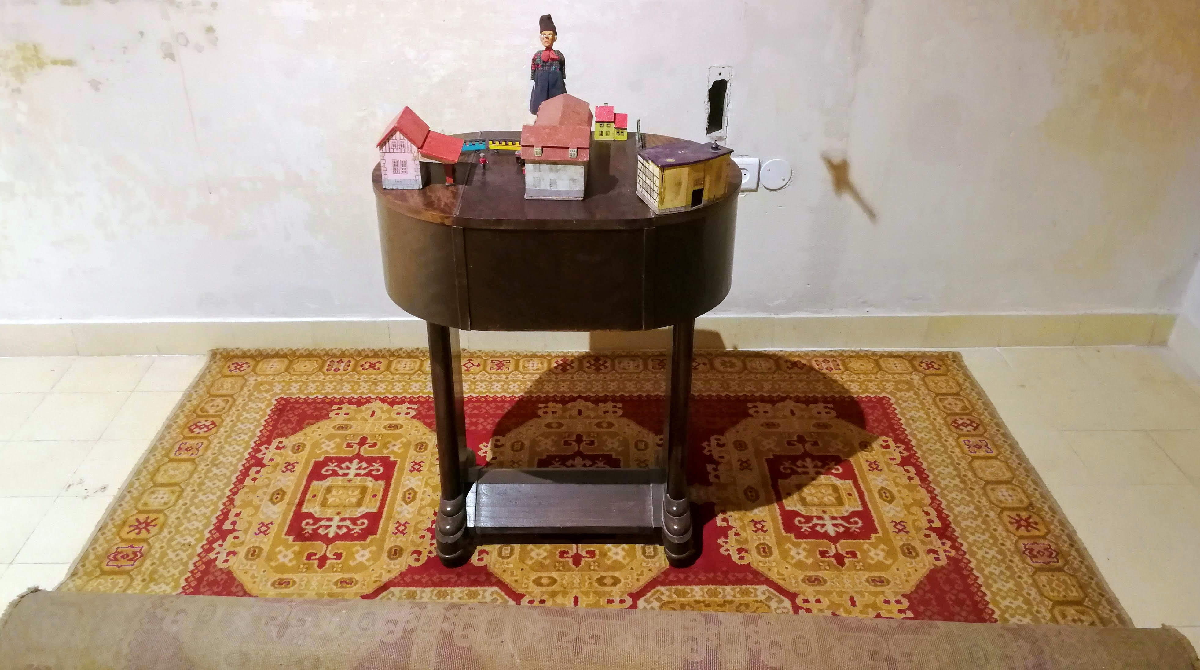 בית מקס ליבלינג, מרכז העיר הלבנה, בניין מודרניסטי בסגנון באוהאוס בעל משמעות אדריכלית. הבית ממוקם ברחוב אידלסון 29, תל אביב. תוכנן על ידי האדריכל דב כרמי ונבנה בשנת 1936.